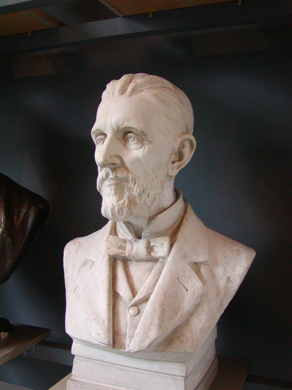 Bust of Otto Donner by Walter Runeberg (son of Johan Ludvig Runeberg)